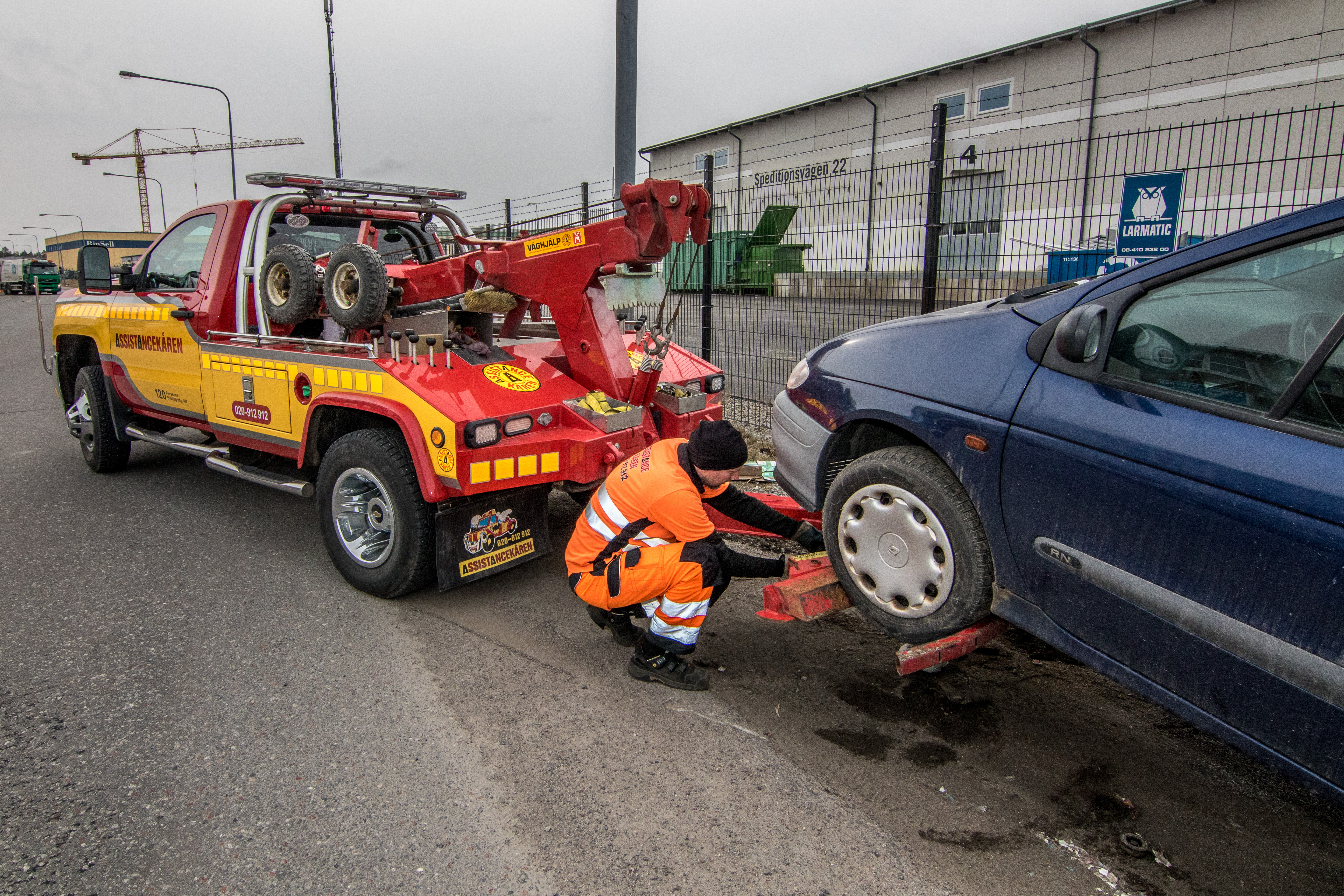 Bärgningsbil